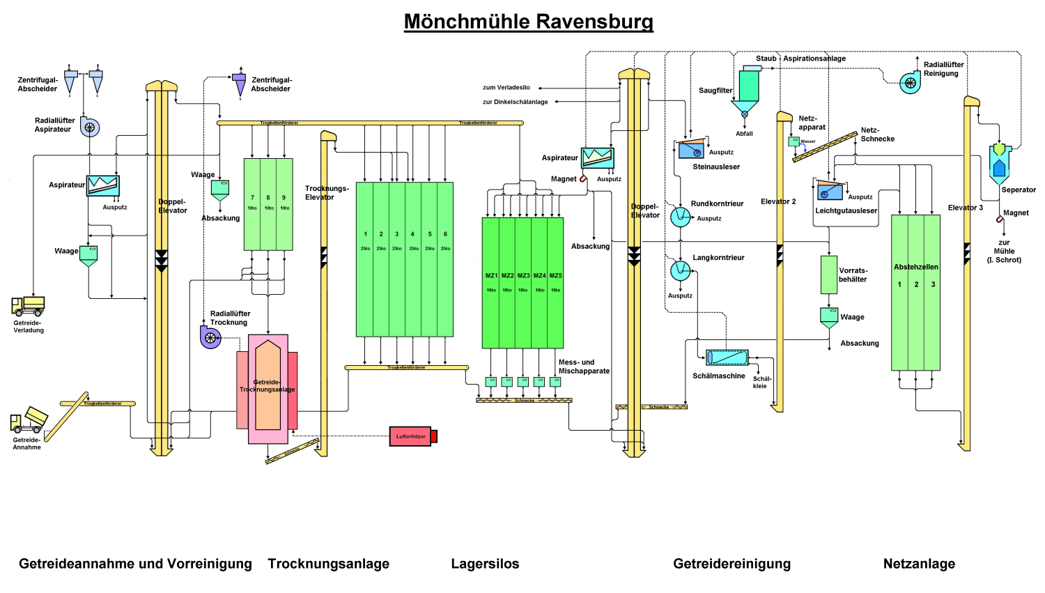 Silo und Getreidereinigungsanlage in der Mönchmühle Ravensburg